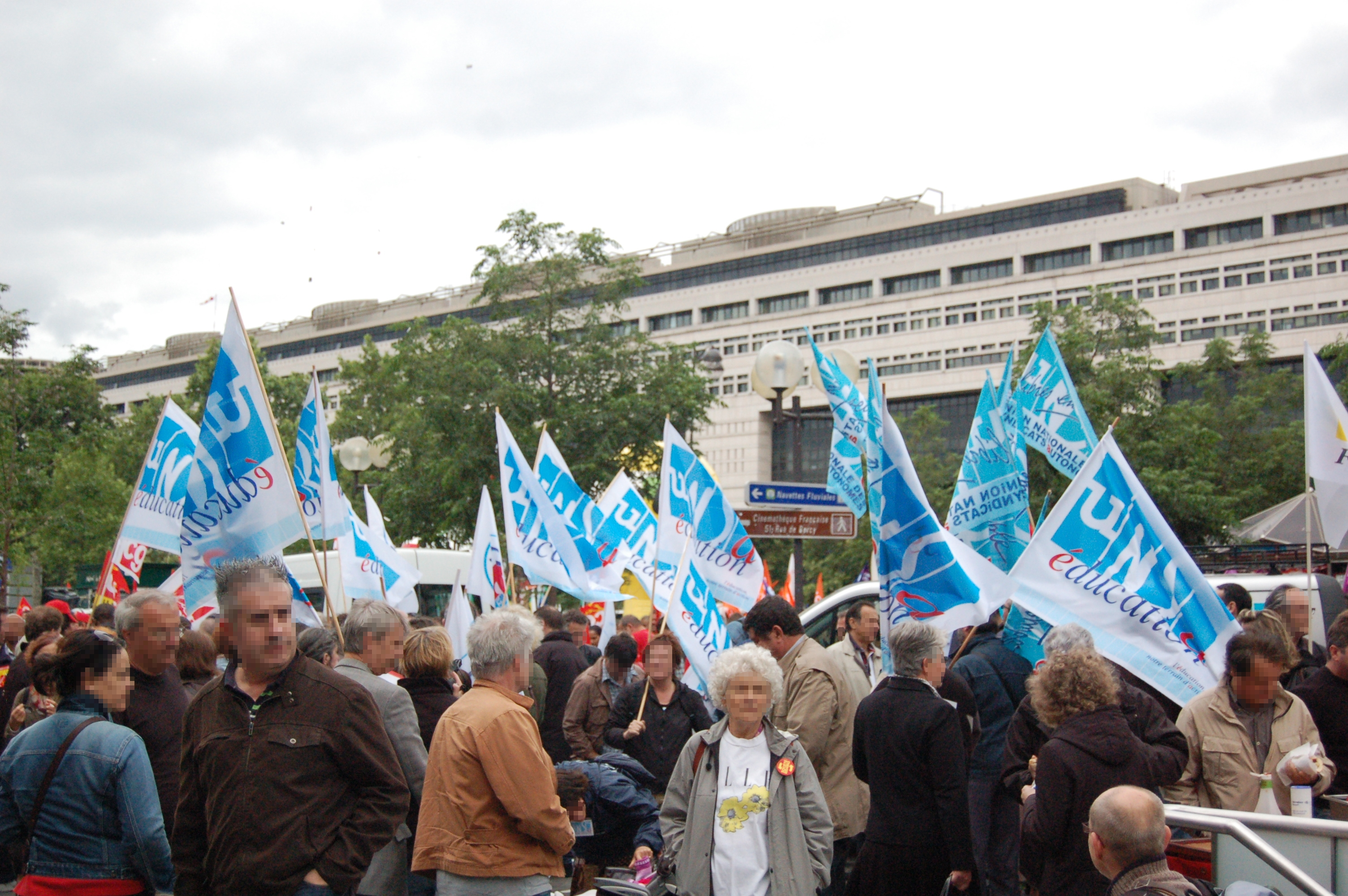 Militants de l'UNSA Education lors de la manifestation des fonctionnaires du 31 mai 2011 devant le Ministère du Budget, des Comptes publics, de la Fonction publique et de la Réforme de l'État à Paris, France.